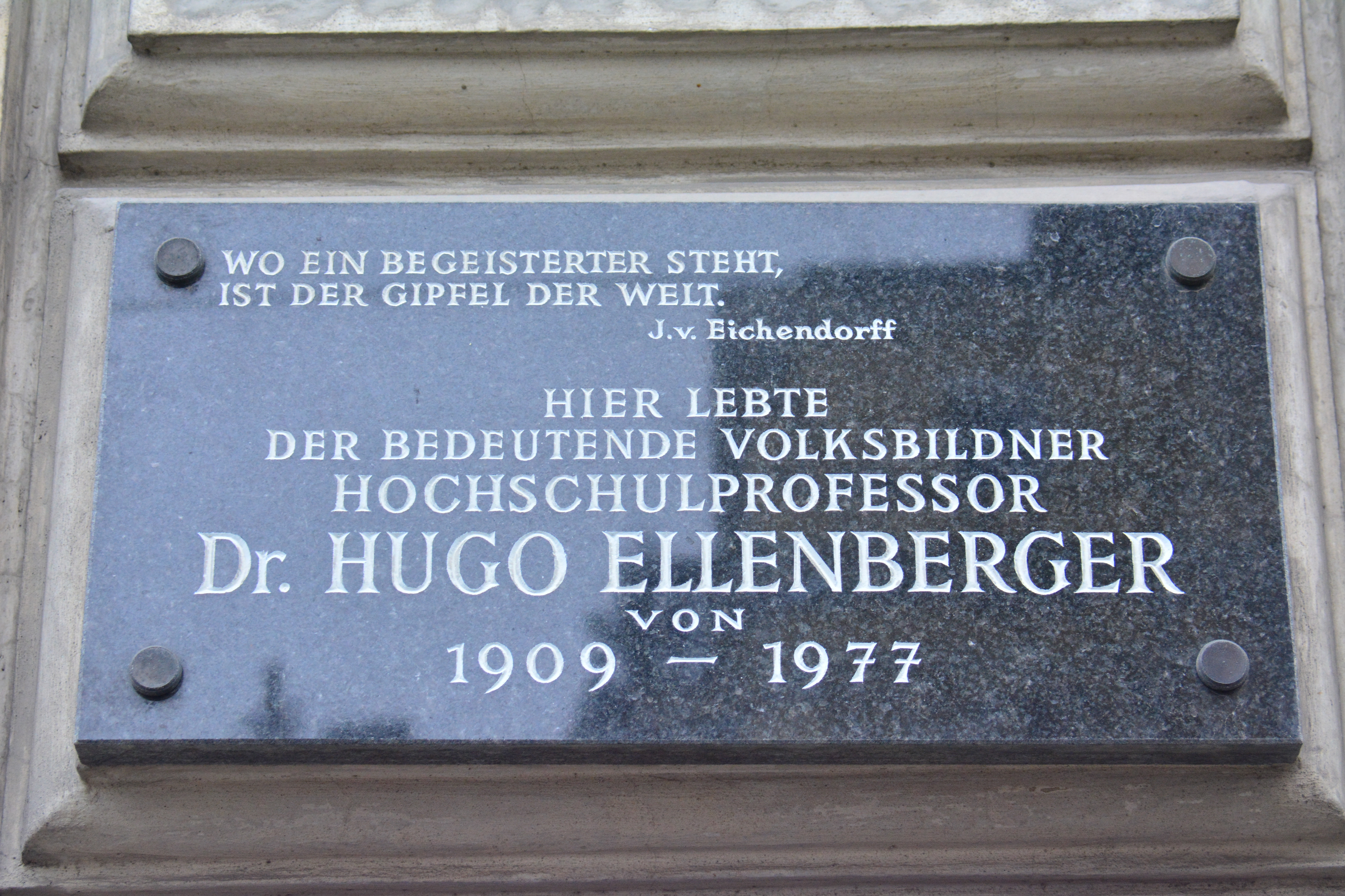 Gedenktafel für Hugo Ellenberger (Wien, Chimanistraße 19)